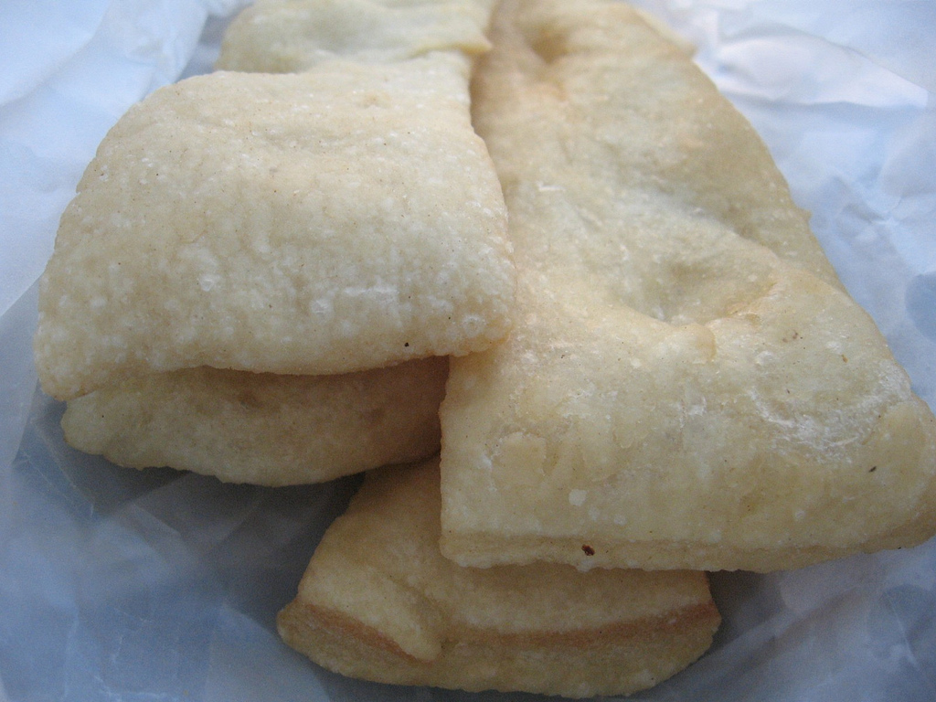 Sgabei!